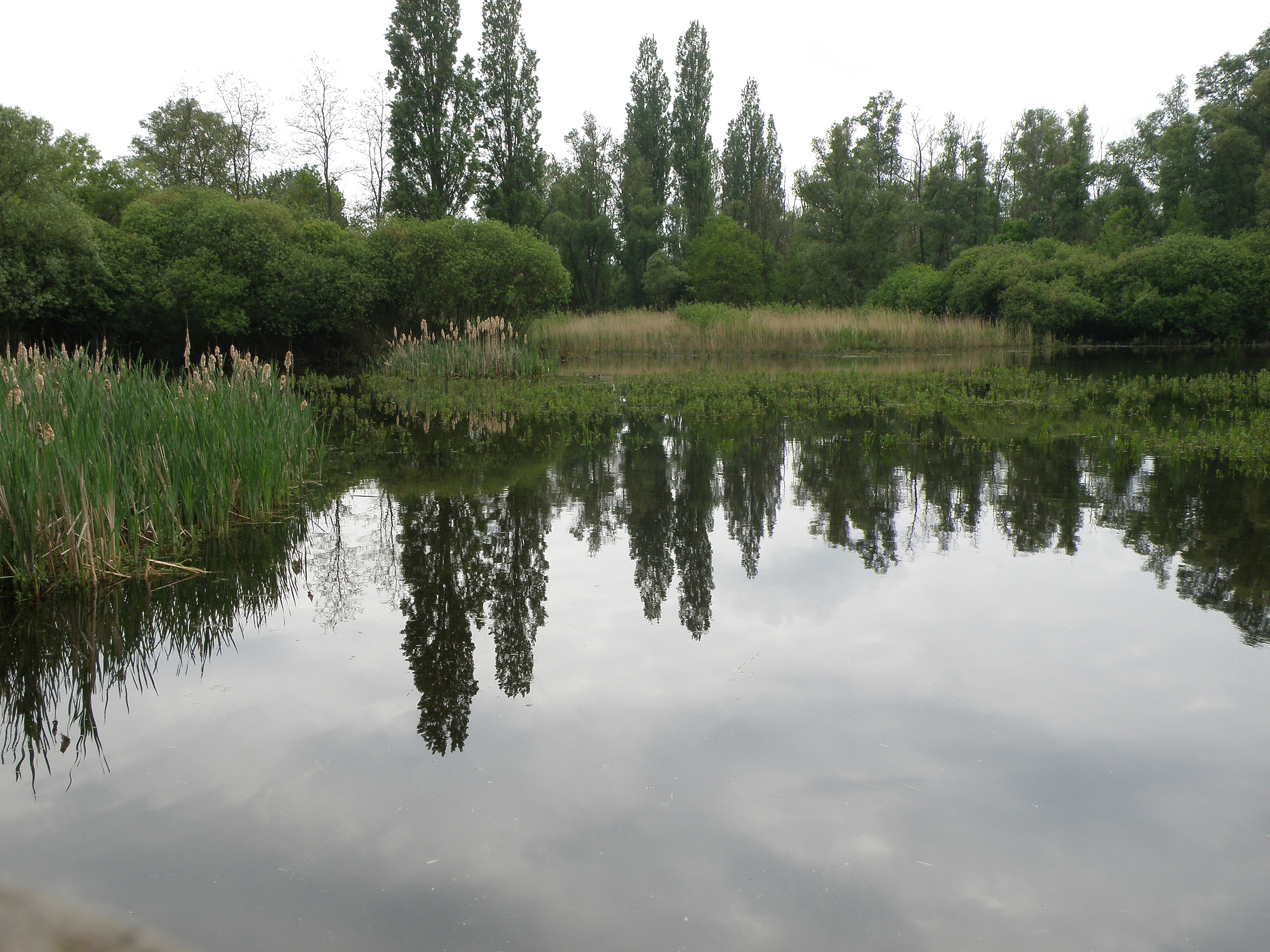 Antwerpen, België. District Hoboken. Natuurgebied Hobokense Polder.